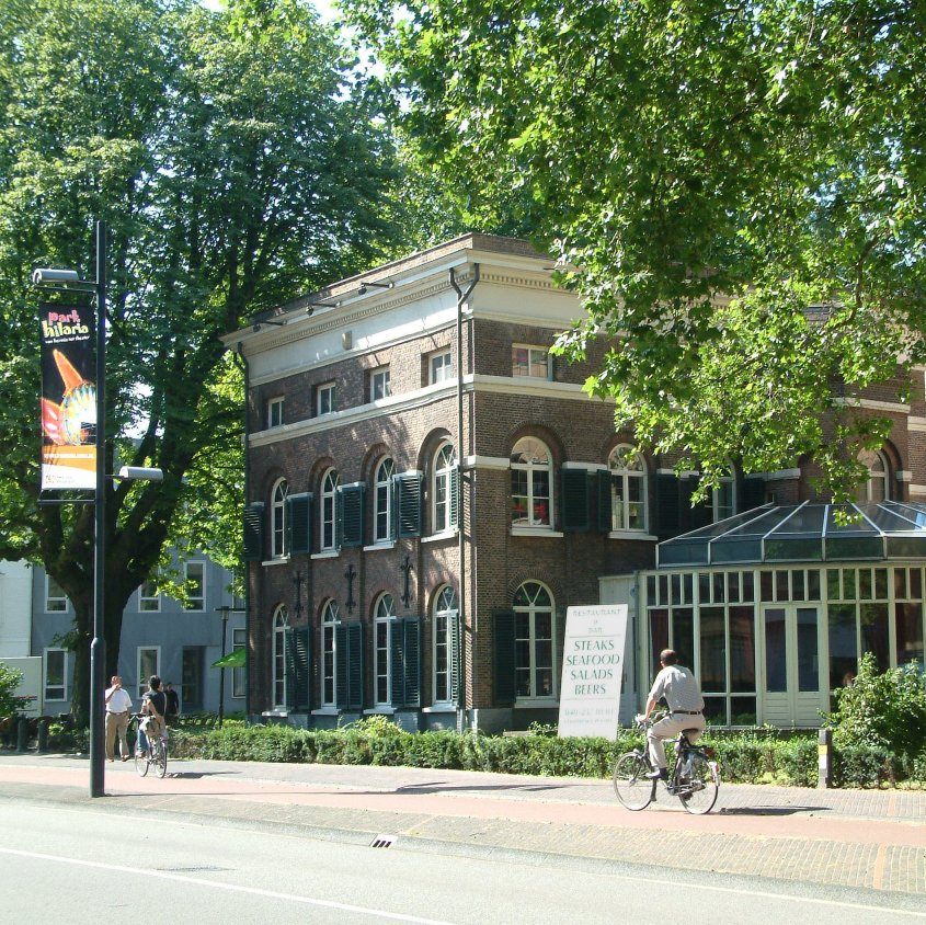 Villa Ravensdonck in Eindhoven (Centrum), hoek Vestdijk - Ten Hagestraat